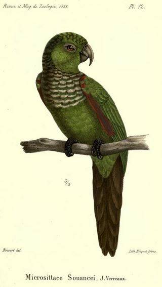 Pyrrhura melanura souancei Syn Microsittace Souancei